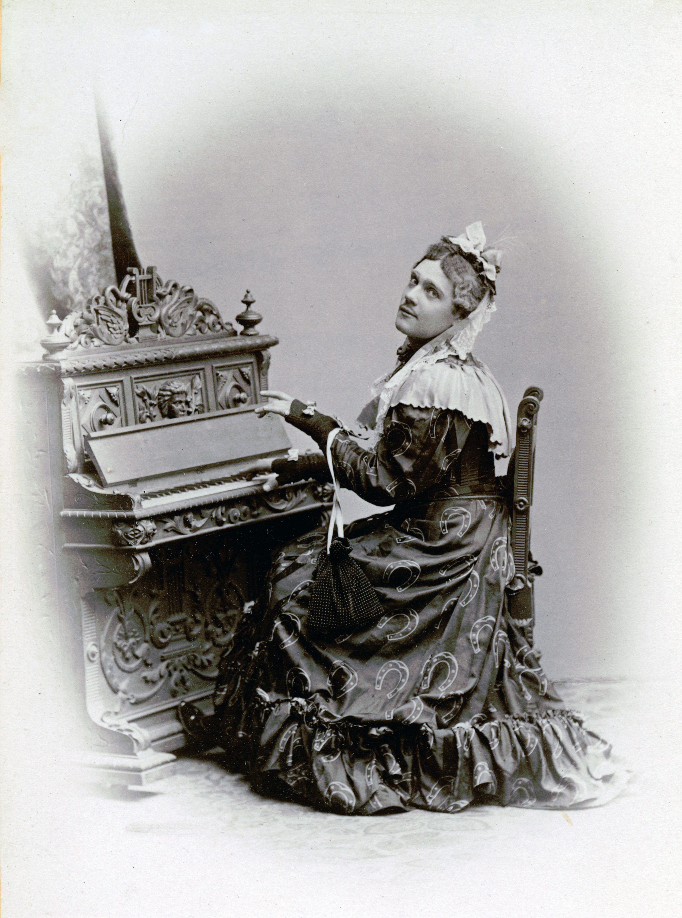 Anders de Wahl som Lord Bobberly i Charleys tant, Djurgårdsteatern 1894